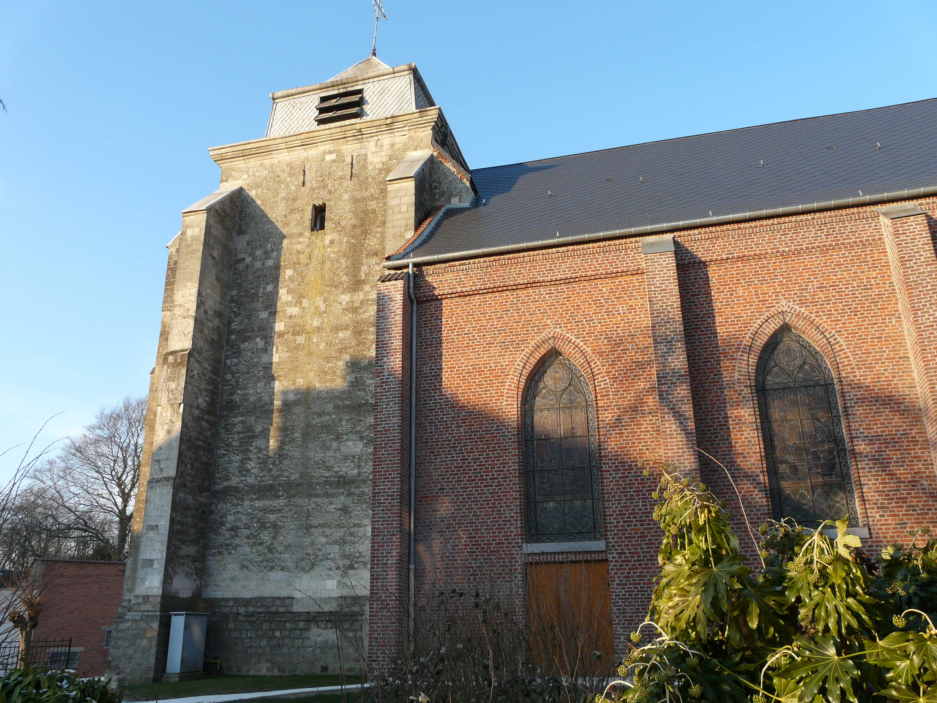 L'église de Bertry (Nord)